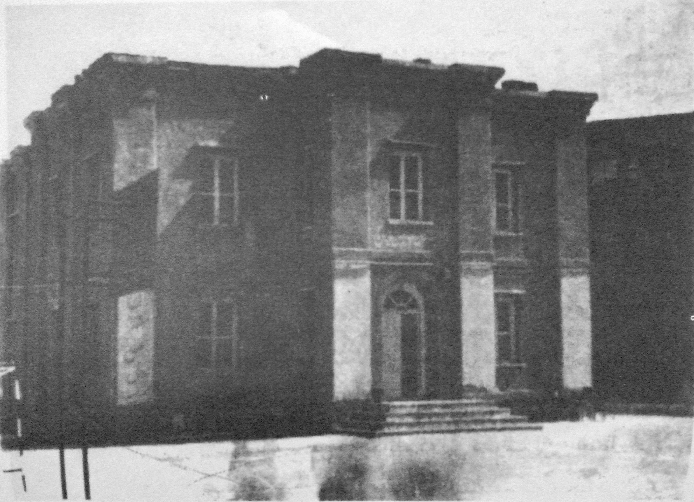 مدرسه مموریال تبریز (دبیرستان پروین)